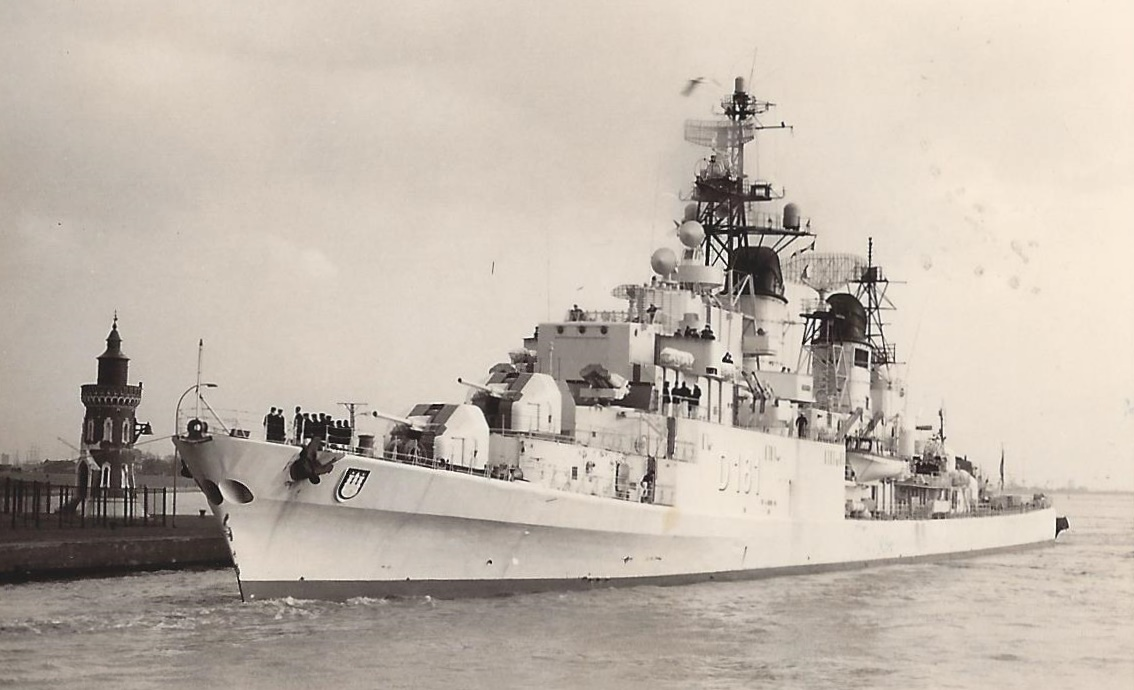 Der deutsche Zerstörer Hamburg (D 181) beim Einlaufen in die Kaiserschleuse Bremerhaven. Die Brücke ist noch offen und nicht umgebaut.